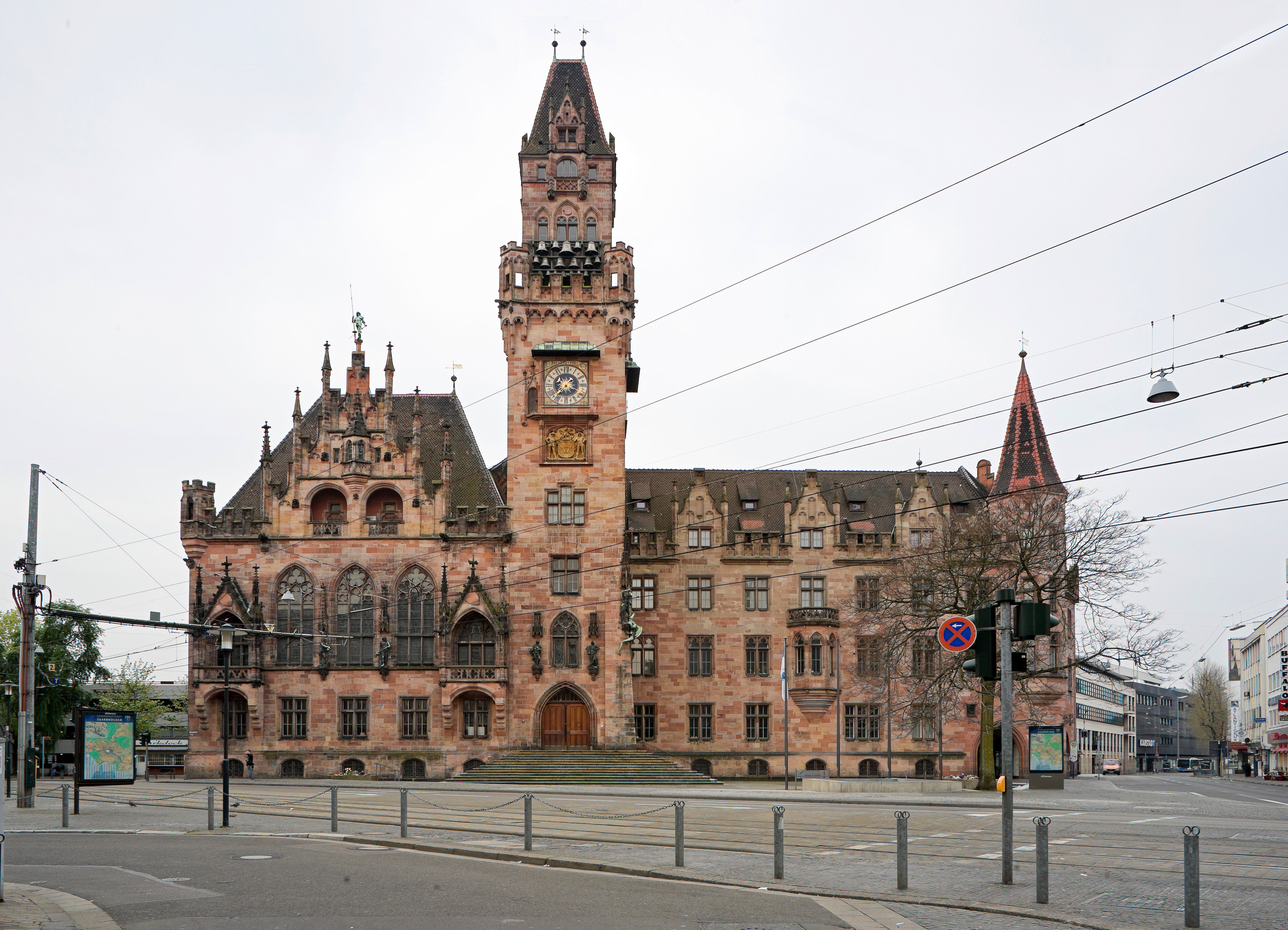 Rathaus Saarbrücken mit einem Tilt-Shift-Objektiv von der Johanneskirche aus fotografiert.